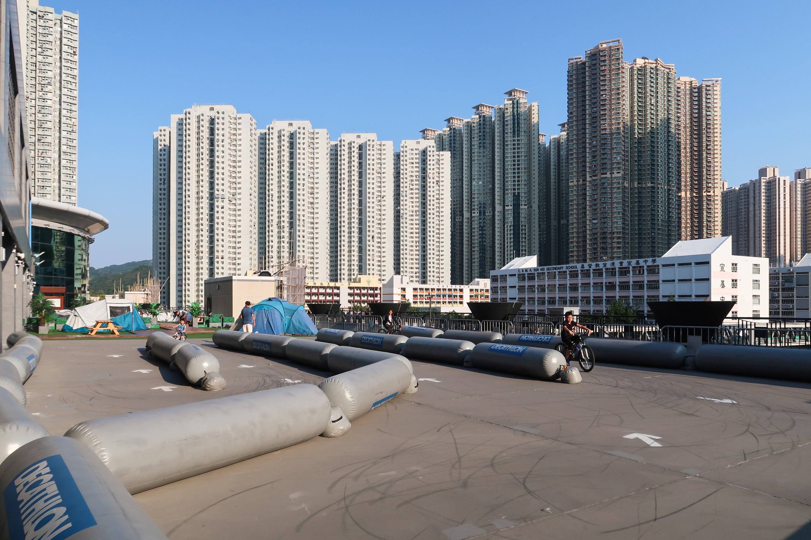 Sheung Tak Plaza Level 3 podium